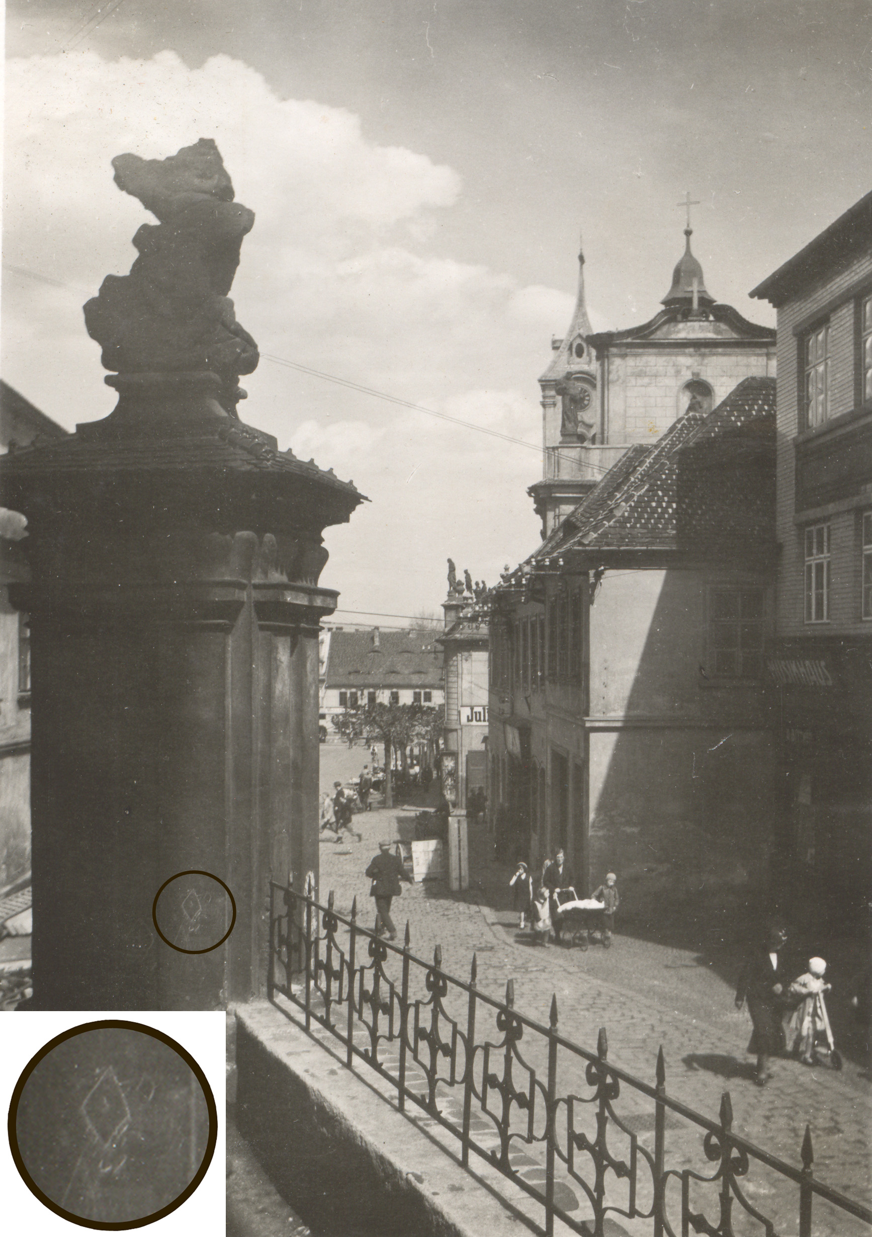 II. Platz in Most (Brüx) mit einem Detail eines eingravierten Vulvasymols auf dem Sockel der Statue eines Büßers